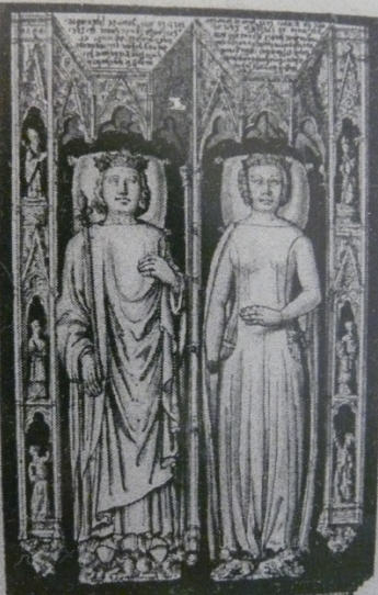 Karel V. a Johana Bourbonská - kresba náhrobku ze Saint-Denis